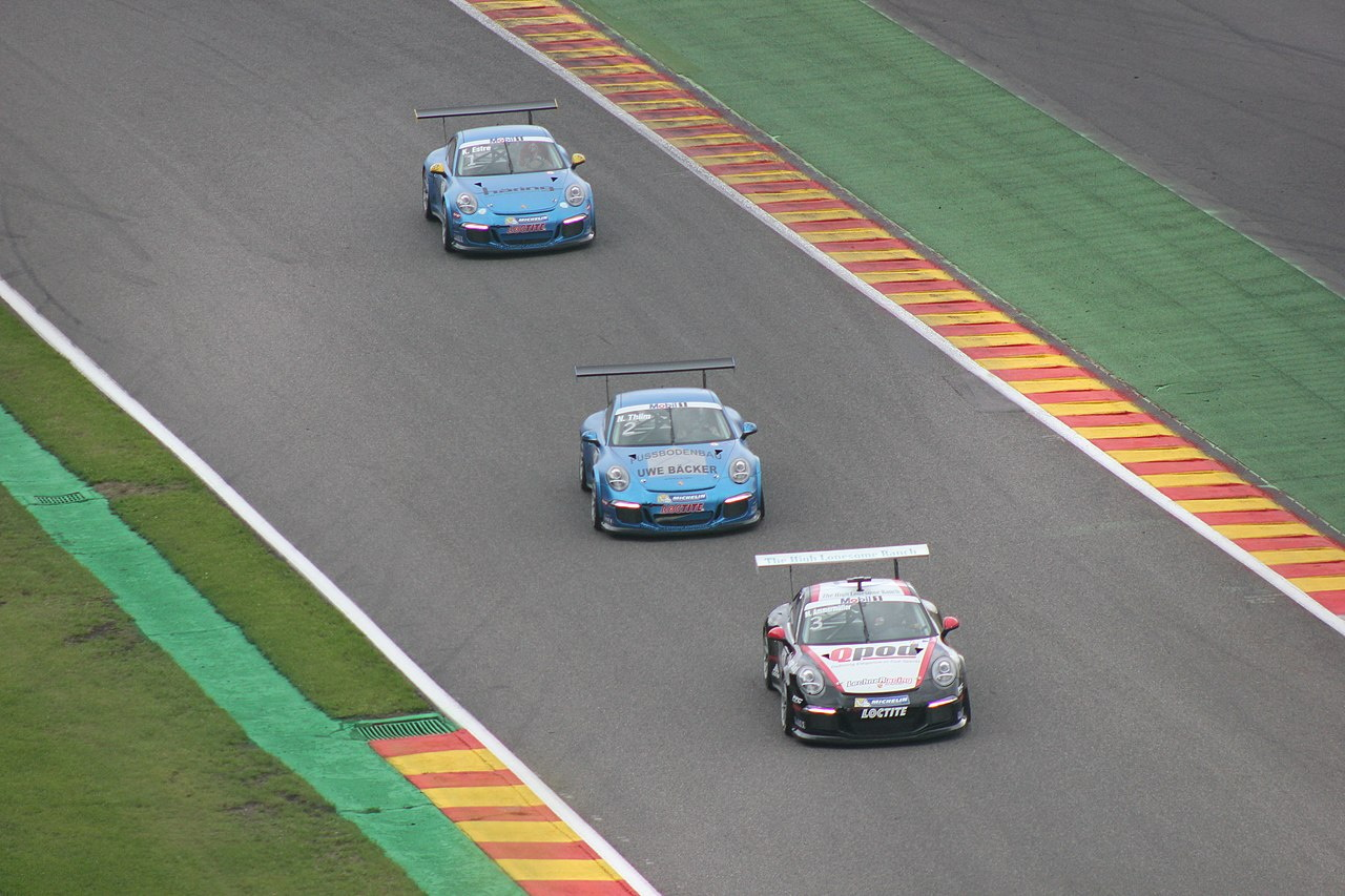 Rennszene vom Rennwochenende in Belgien 2013